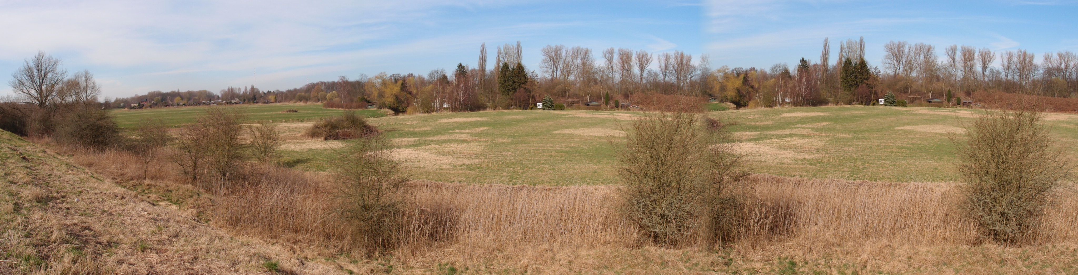 Ausgleichsfläche für den DB Huckepackbahnhof zwischen den Bahndämmen